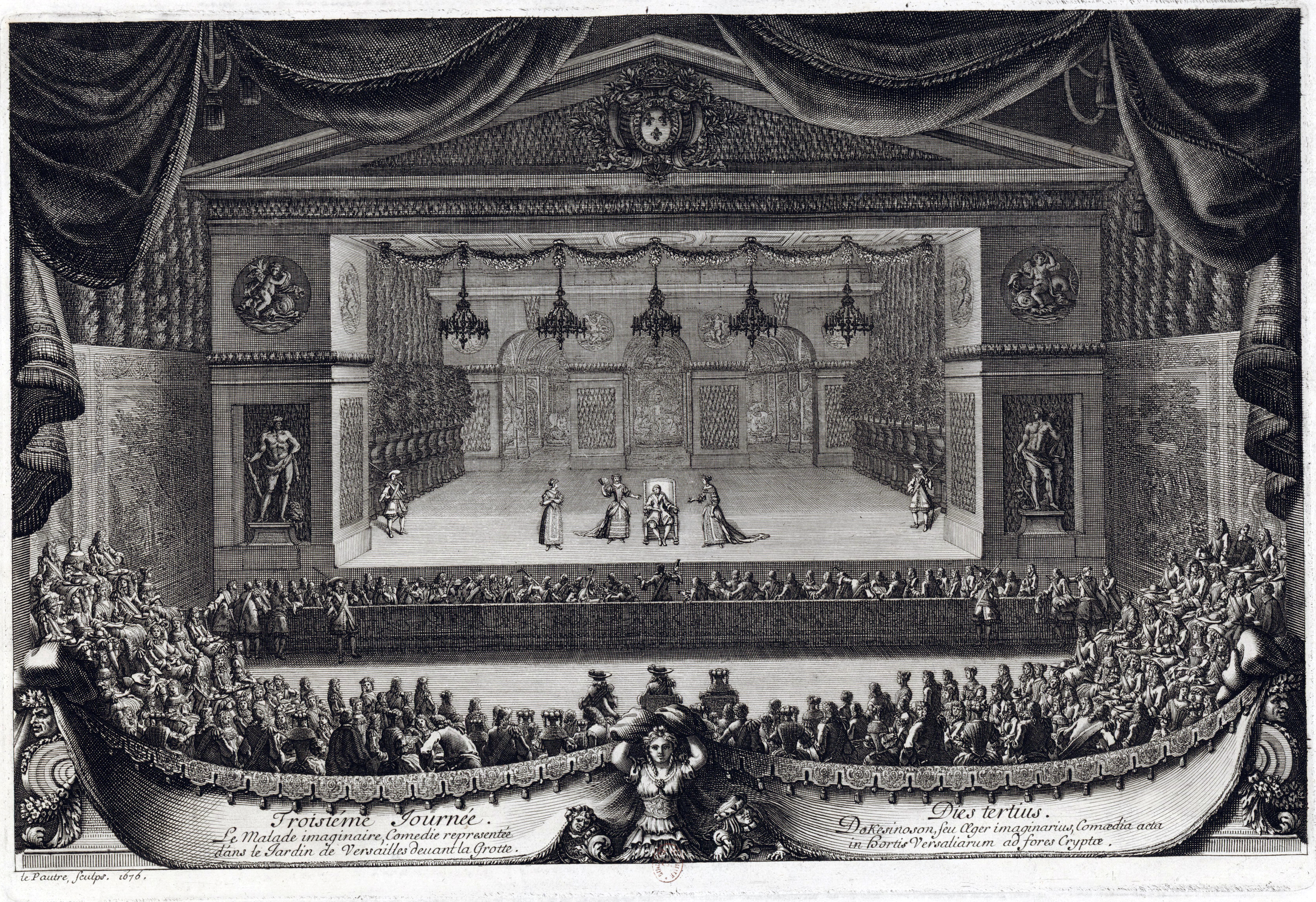 Estampe